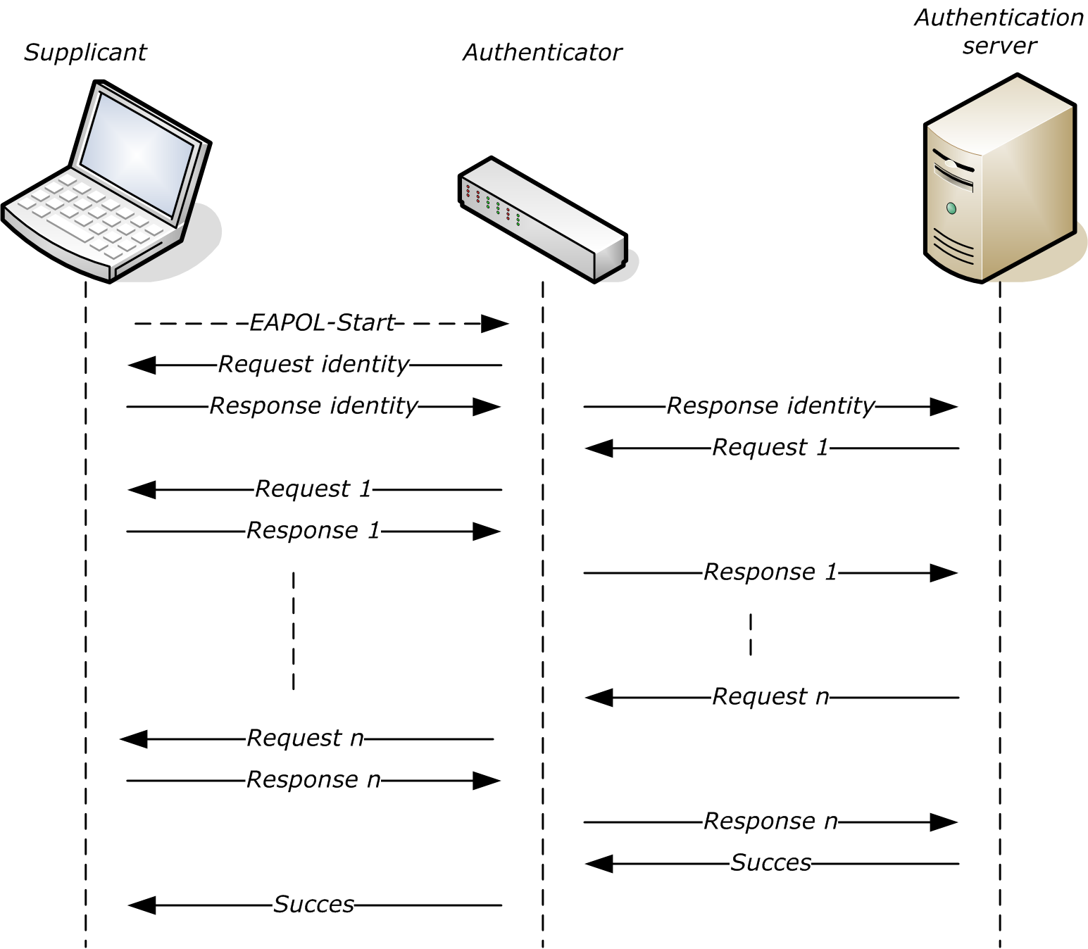 Description: Schematische voorstelling EAP authenticatie Source: eigen werk Author: Charles Vercauteren